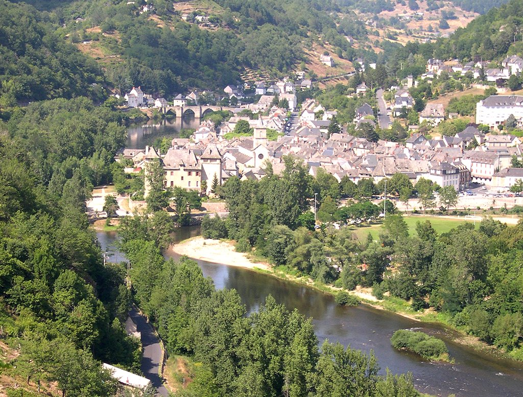 Photographie d'ensemble de la ville d'Entraygues-sur-Truyère (Aveyron, France). Au premier plan le Lot, et au-delà du château, la Truyère.